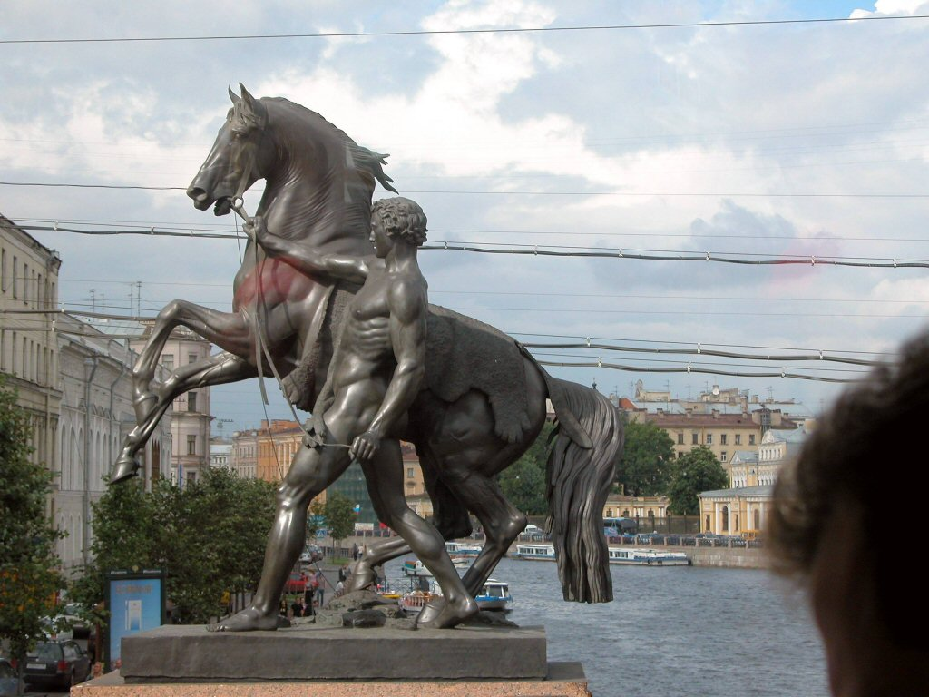 Einer der beiden Rossebändiger in St. Petersburg auf der Anitschkoffbruecke